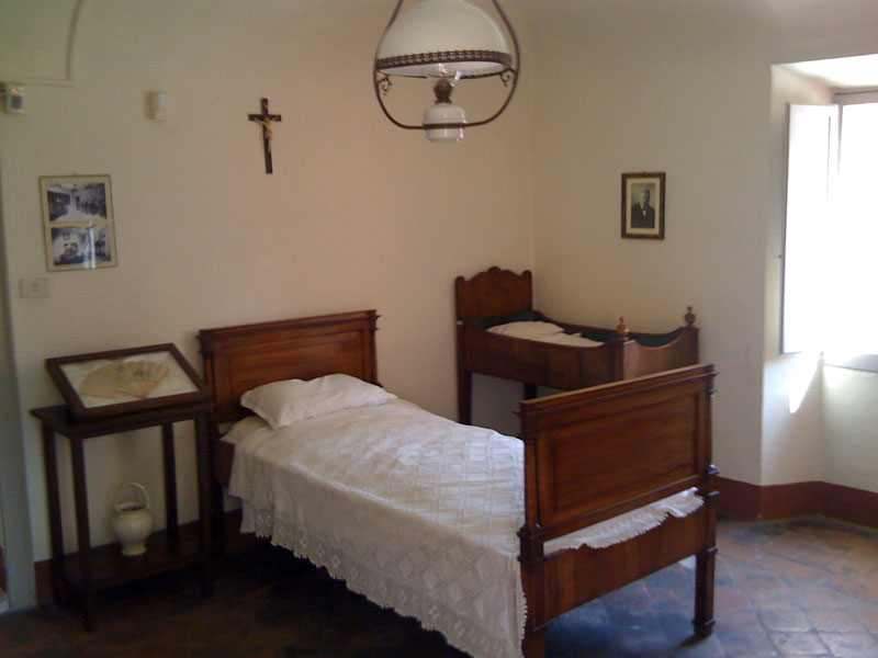 Autore: Nicholas Montemaggi Descrizione: La camera da letto di Casa Pascoli Licenza: Creative Commons Attribuzione 2.0